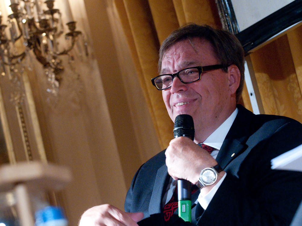 Markku Nurmi